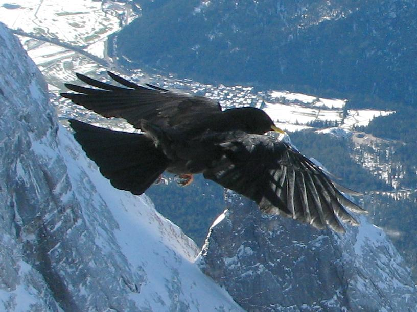 Alpendohle im Gleitflug über dem Zugspitzeck.